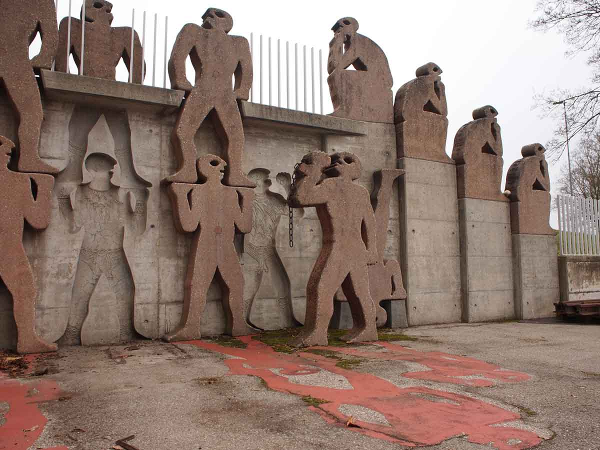 Teil der künstlerischen Gestaltung in der Strafanstalt Witzwil, Gampelen Kanton Bern.